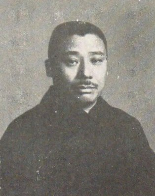 桜井兵五郎